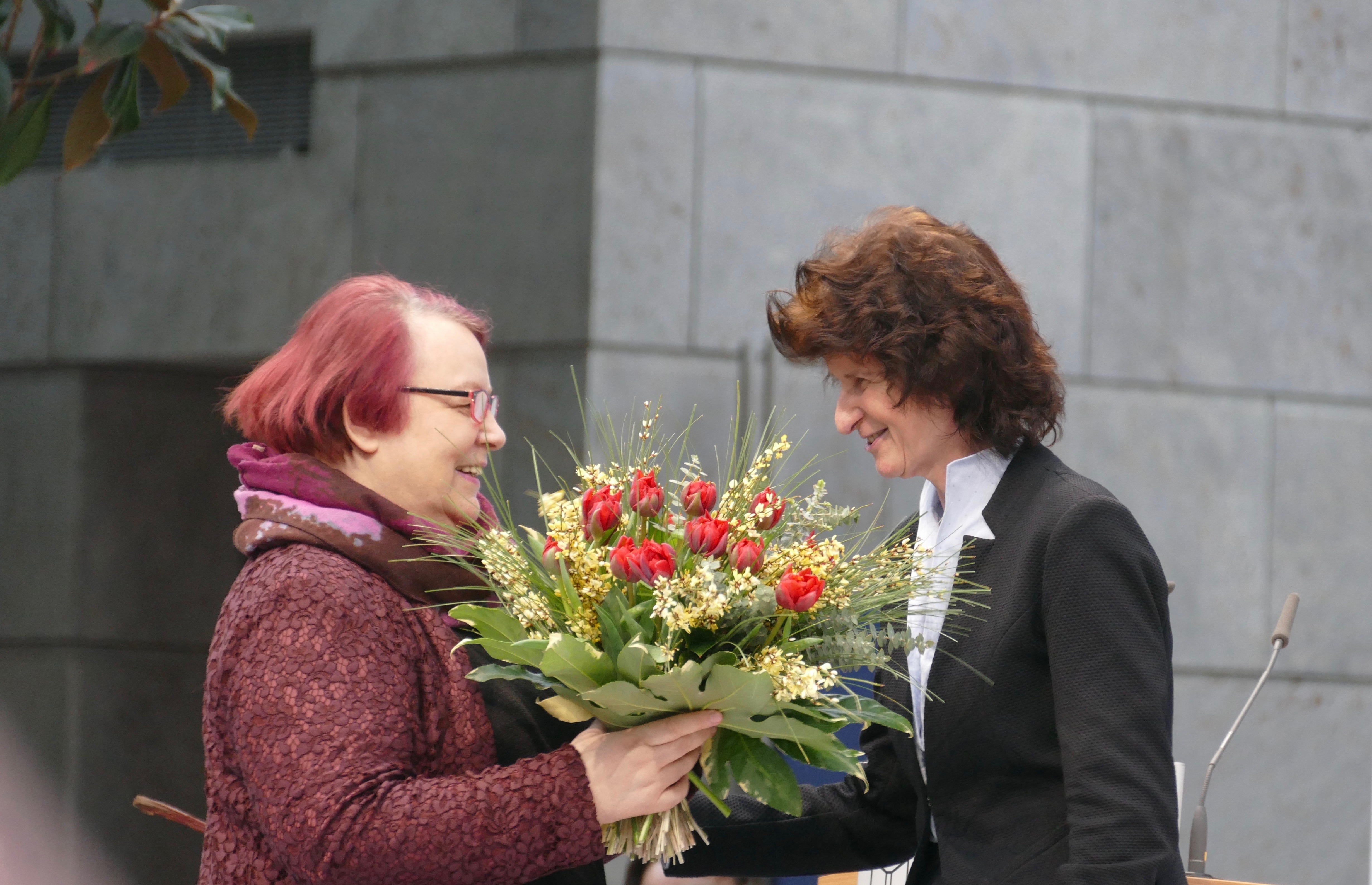 Blumen für Natascha Wodin - Preis der Leipziger Buchmesse 2017. Überreicht von Eva-Maria Stange (rechts), Staatsministerin für Wissenschaft und Kunst des Freistaat Sachsen